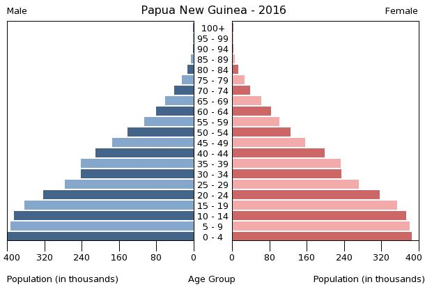 A population pyramid illustrates the age and sex structure of a country's population and may provide insights about political and social stability, as well as economic development. The population is distributed along the horizontal axis, with males shown on the left and females on the right. The male and female populations are broken down into 5-year age groups represented as horizontal bars along the vertical axis, with the youngest age groups at the bottom and the oldest at the top. The shape of the population pyramid gradually evolves over time based on fertility, mortality, and international migration trends.